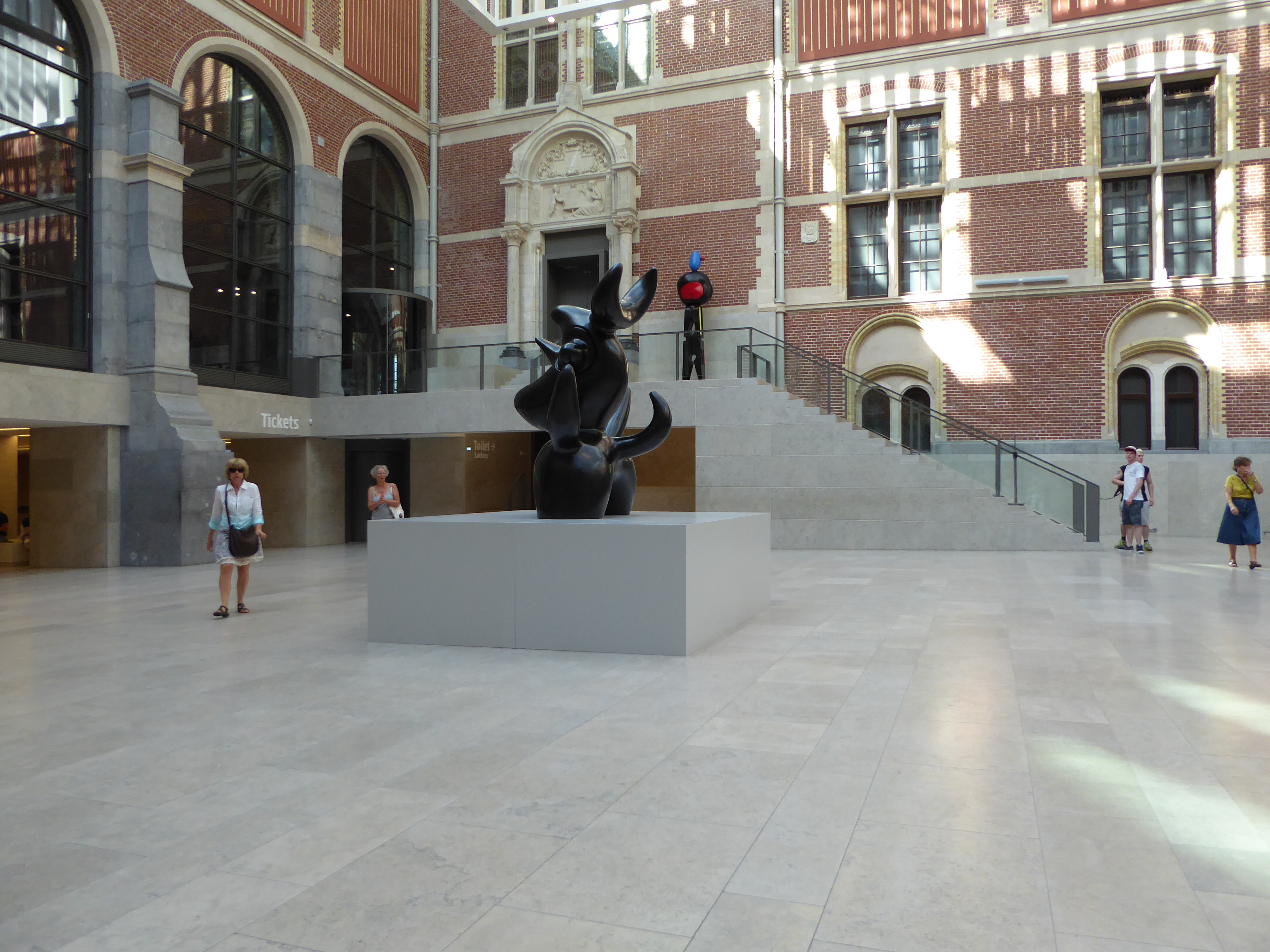 Escultures de Joan Miró al hall del Rijksmuseum